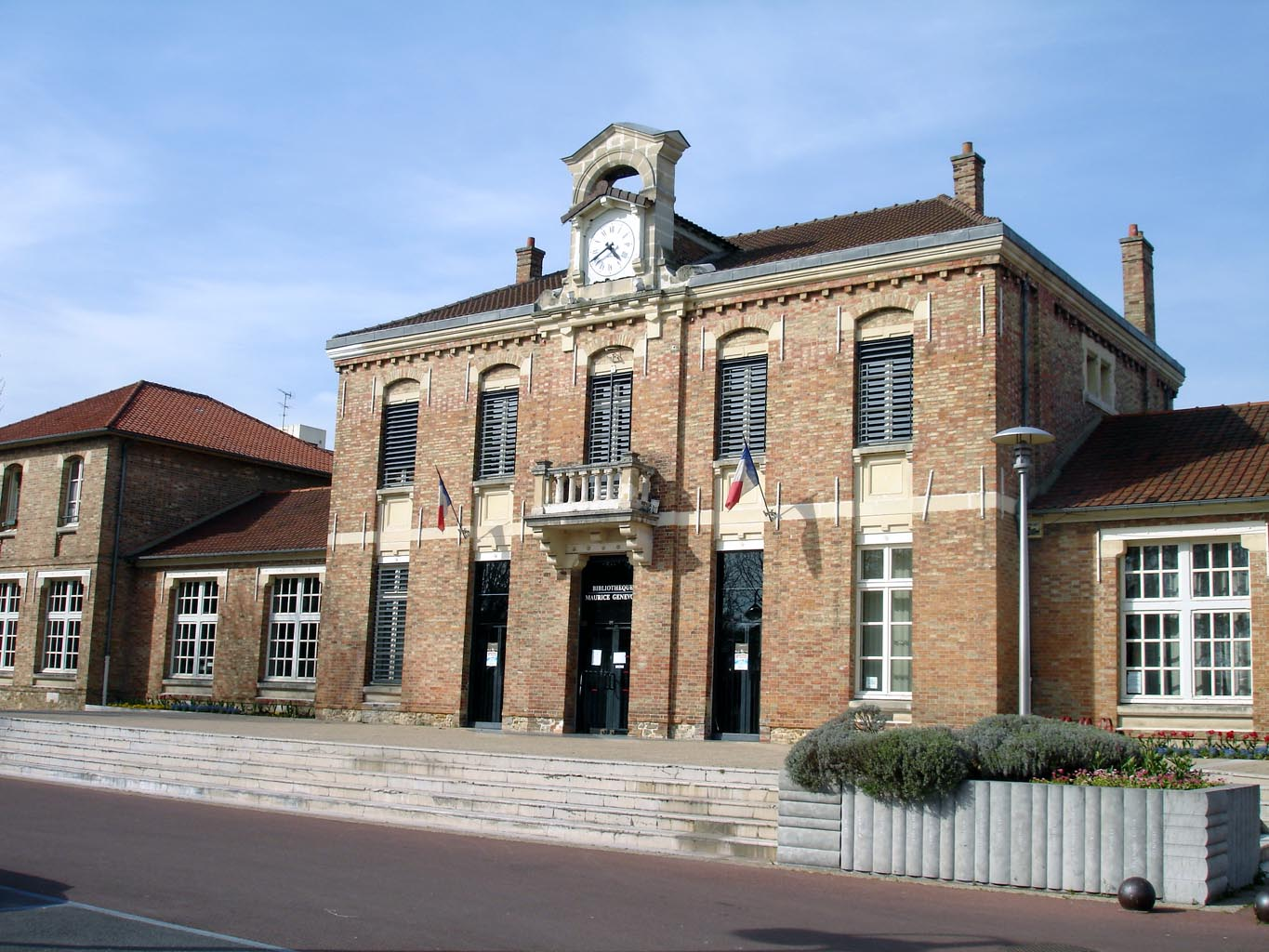 Bibliothèque Maurice-Genevoix à Eaubonne (Val-d'Oise), France